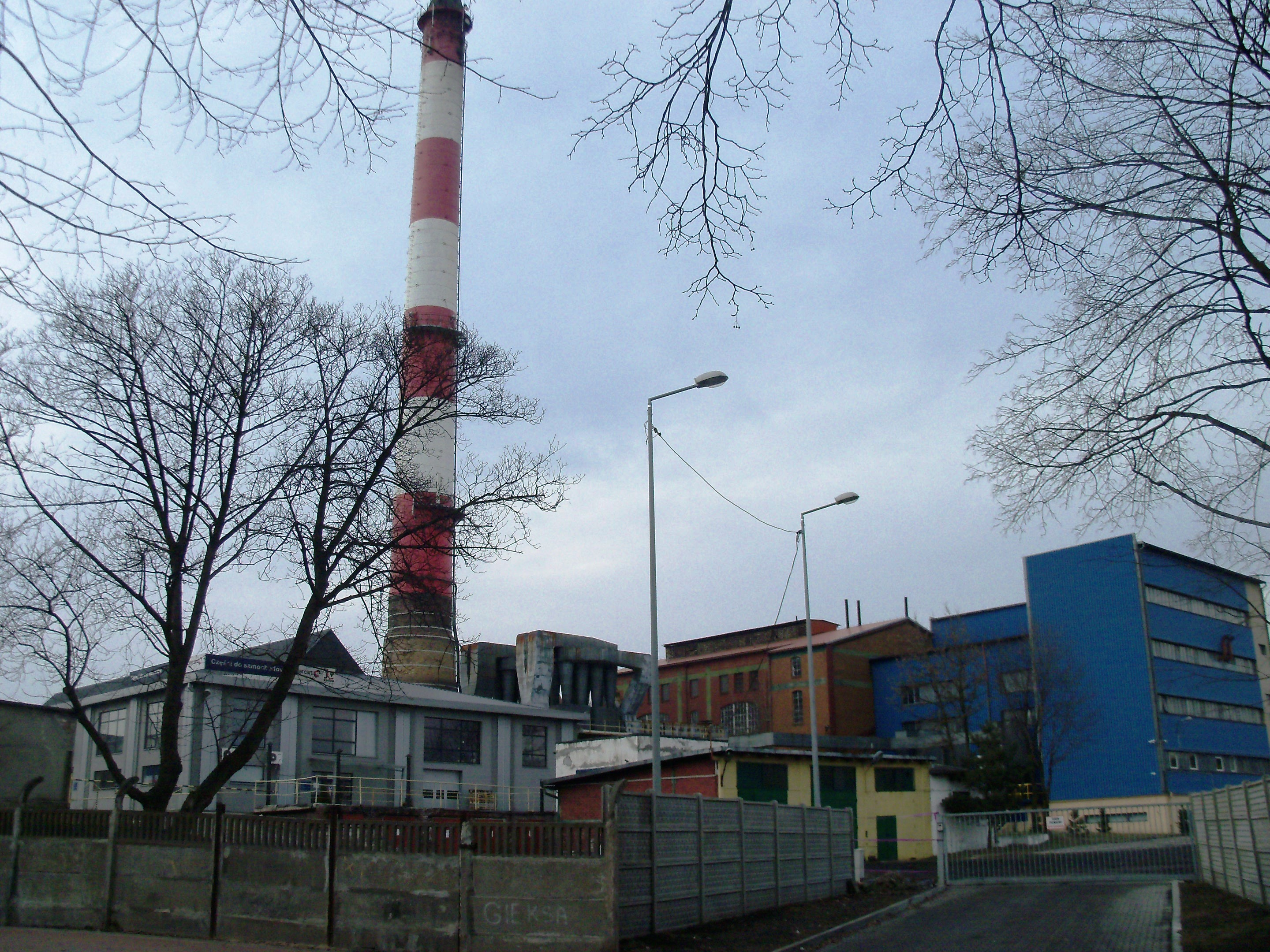 Zabudowania Kopalni Węgla Kamiennego "Kleofas" w Katowicach - widok od strony ulicy Obroki